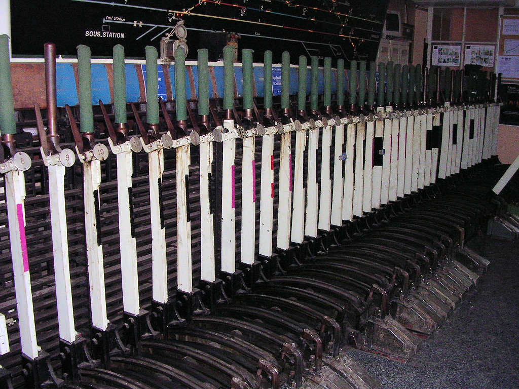 France - Ligne de Tarascon à Narbonne - Gare de Nîmes - Poste 4 de type Saxby